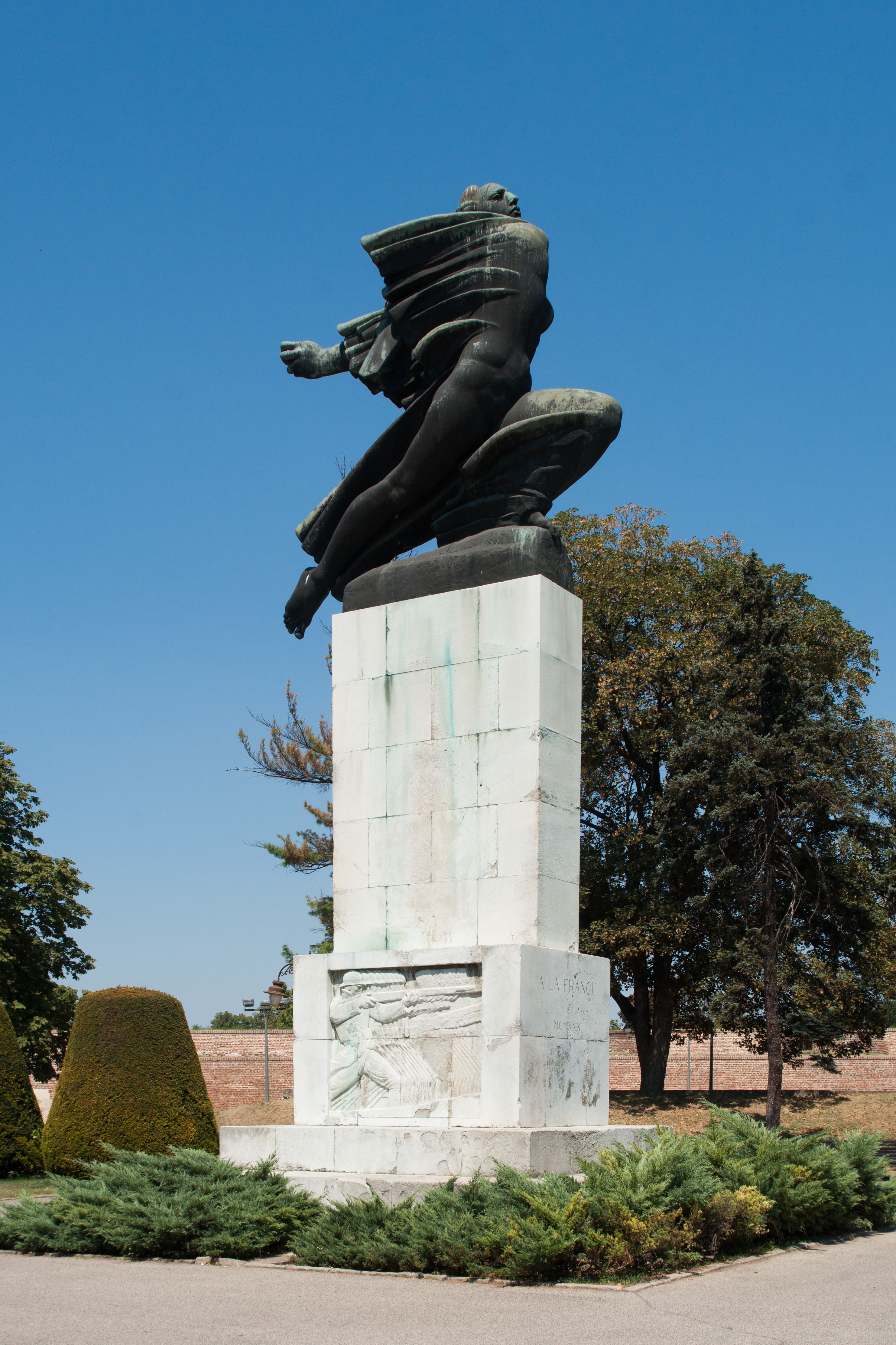 A la France, Kalemegdan - Belgrade